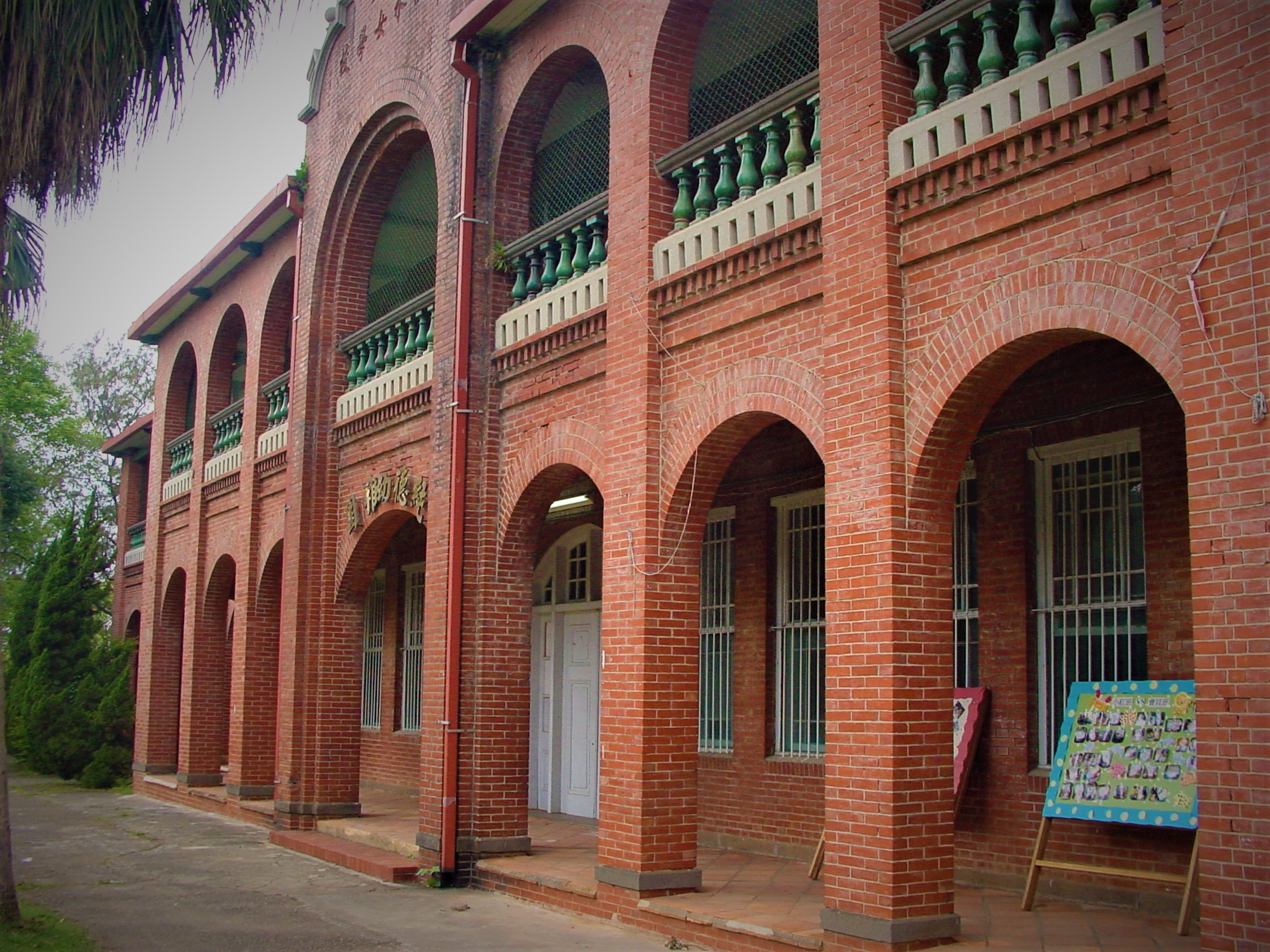 中文（台灣）: 新北市淡水女學堂